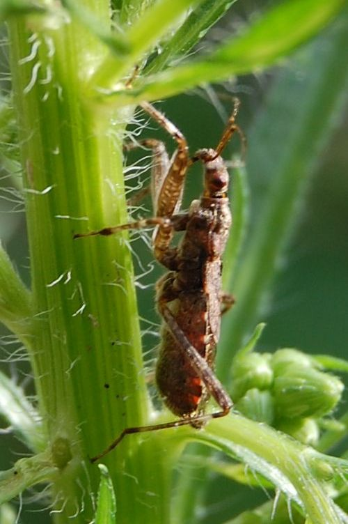 Himacerus apterus, Baumsichelwanze, Weibchen, Berlin Wedding, 7. Juli 2007, Profil. own work